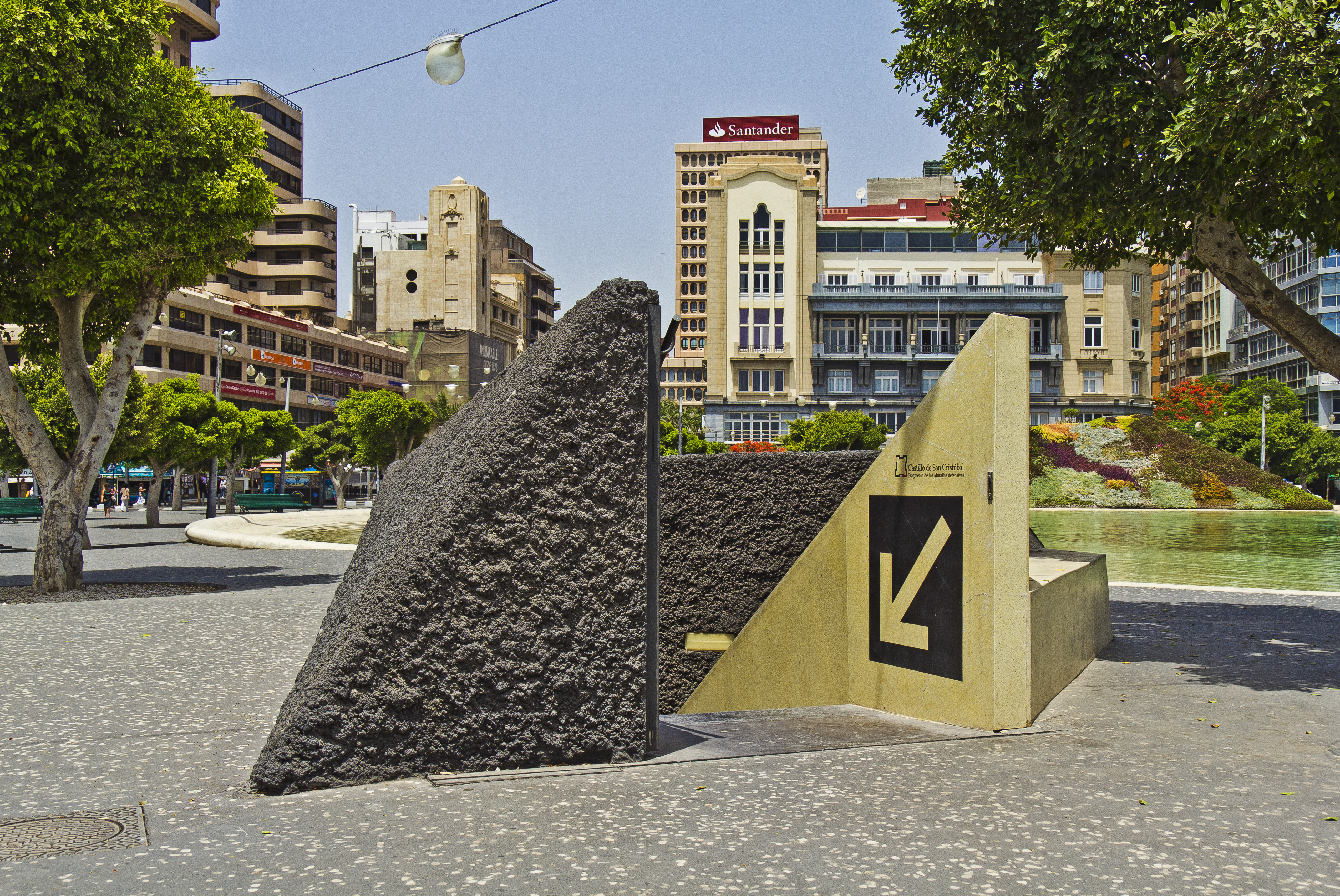 Eingang des Museums „Castillo de San Cristóbal“ auf der Plaza de España in Santa Cruz de Tenerife